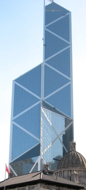 Description : Tour de la banque de Chine, Central, Hong Kong, Chine, de jour, en 2001. License : GNU FDL Auteur : User:Popolon